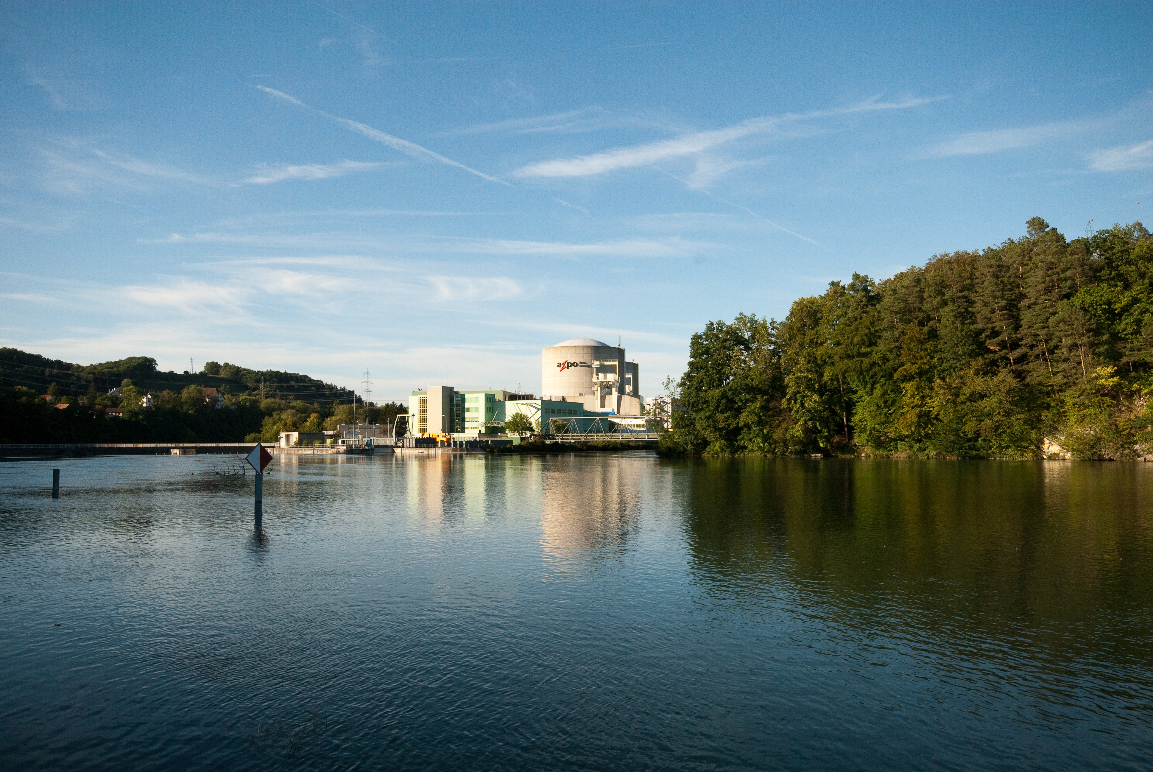 KKW Beznau